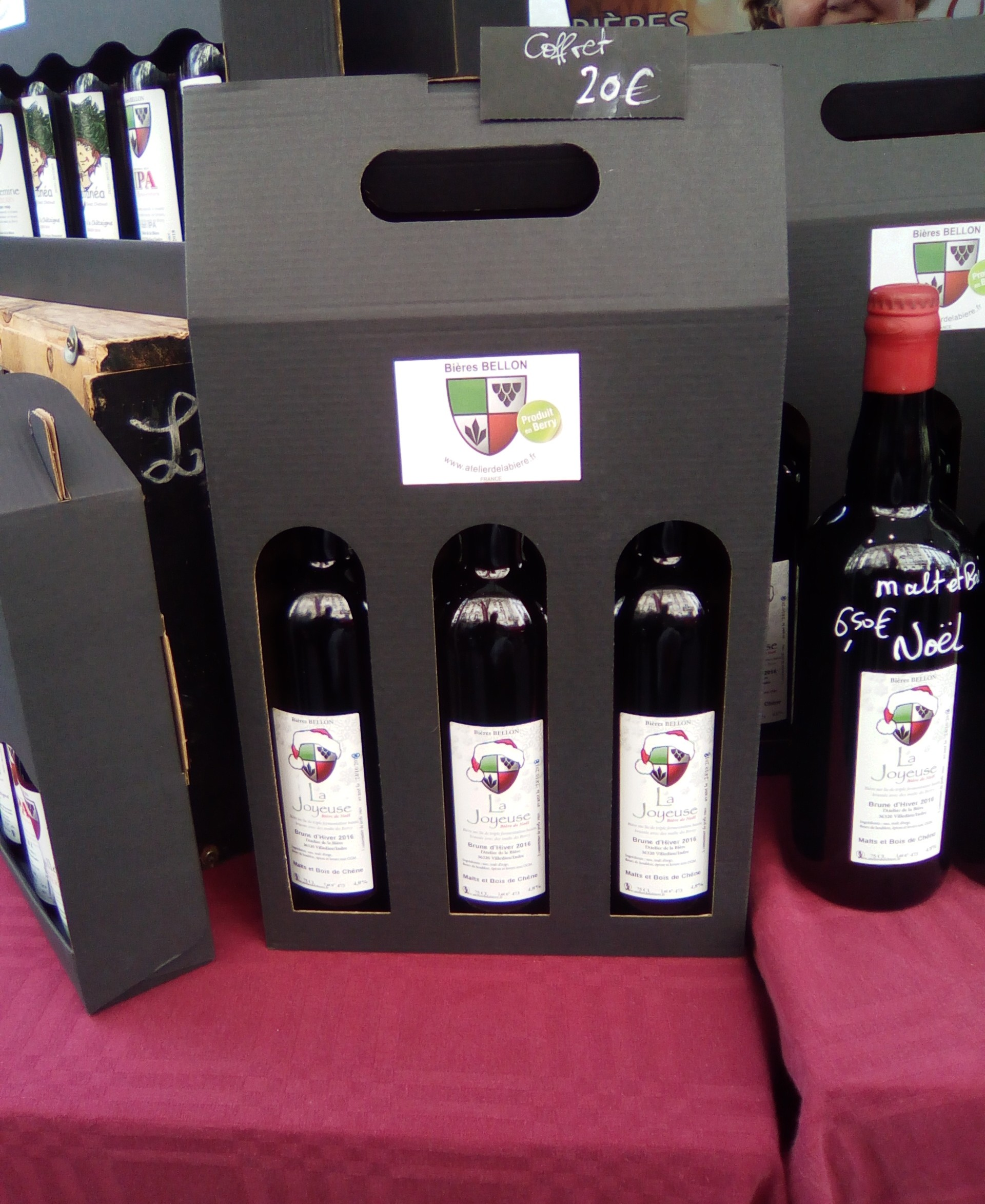 Stand des bières artisanales "Bellon", au marché des Producteurs de Pays, boulevard de Reuilly